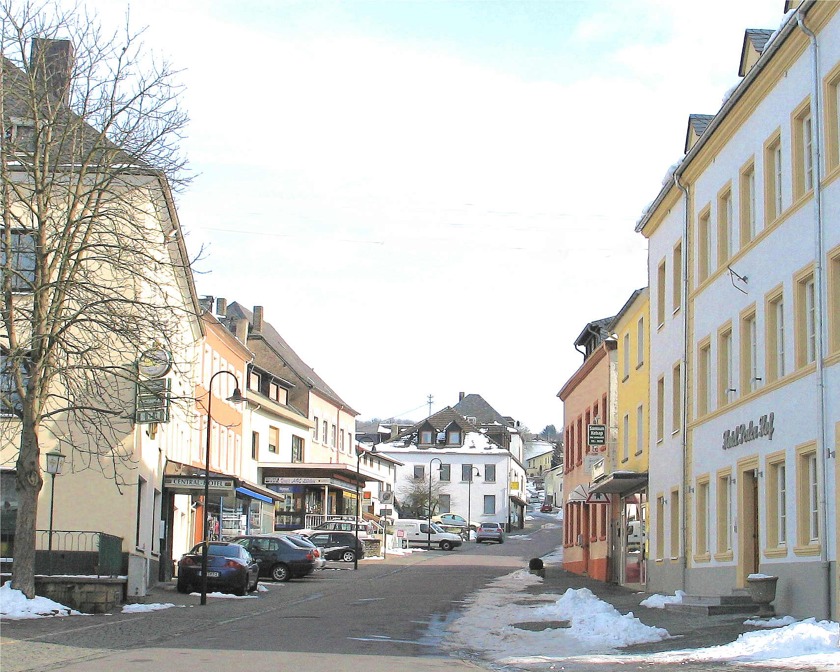 Perl (Saarland)